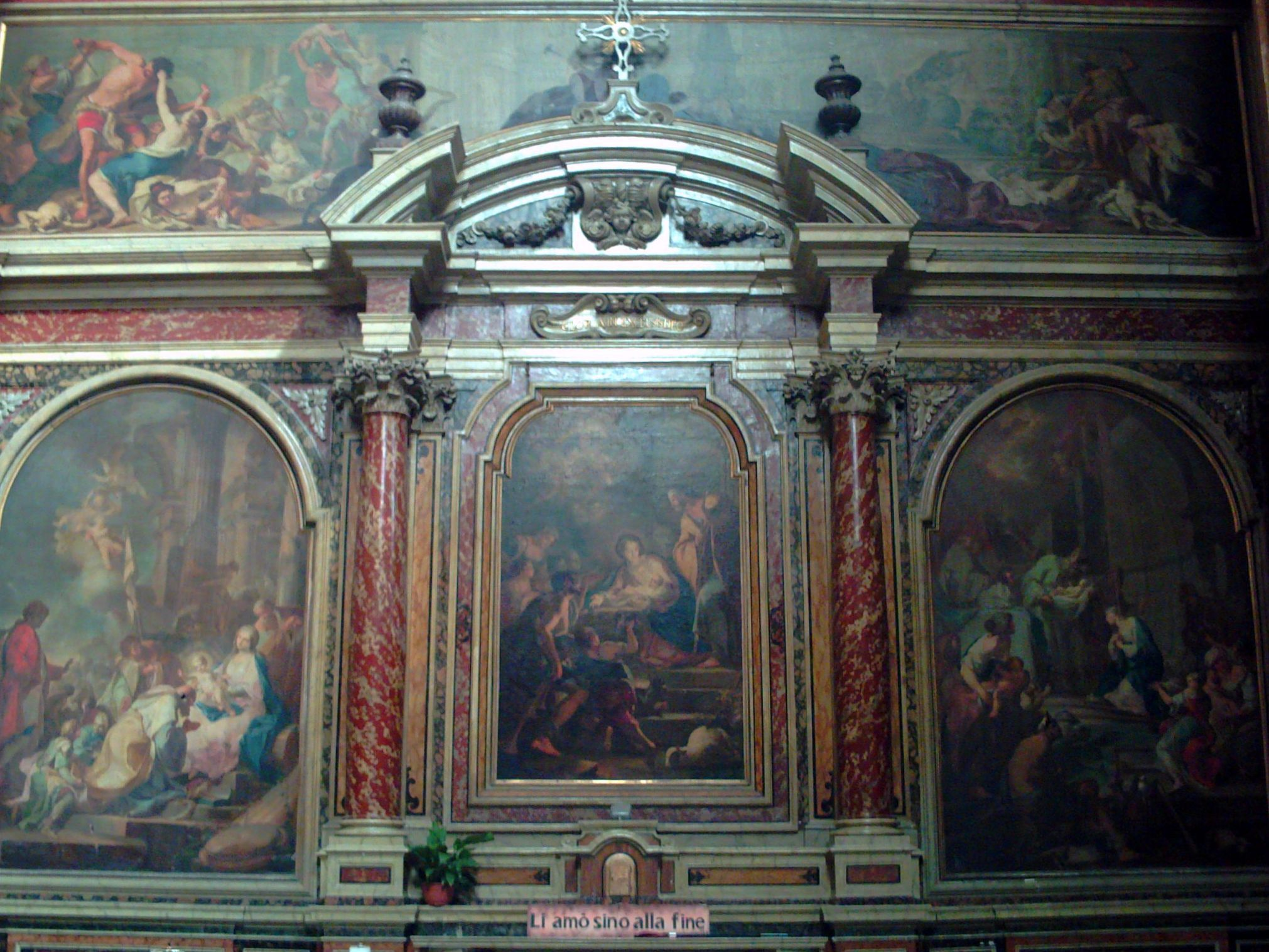 Altare laterale, Chiesa della Pietà dei Turchini (Napoli)